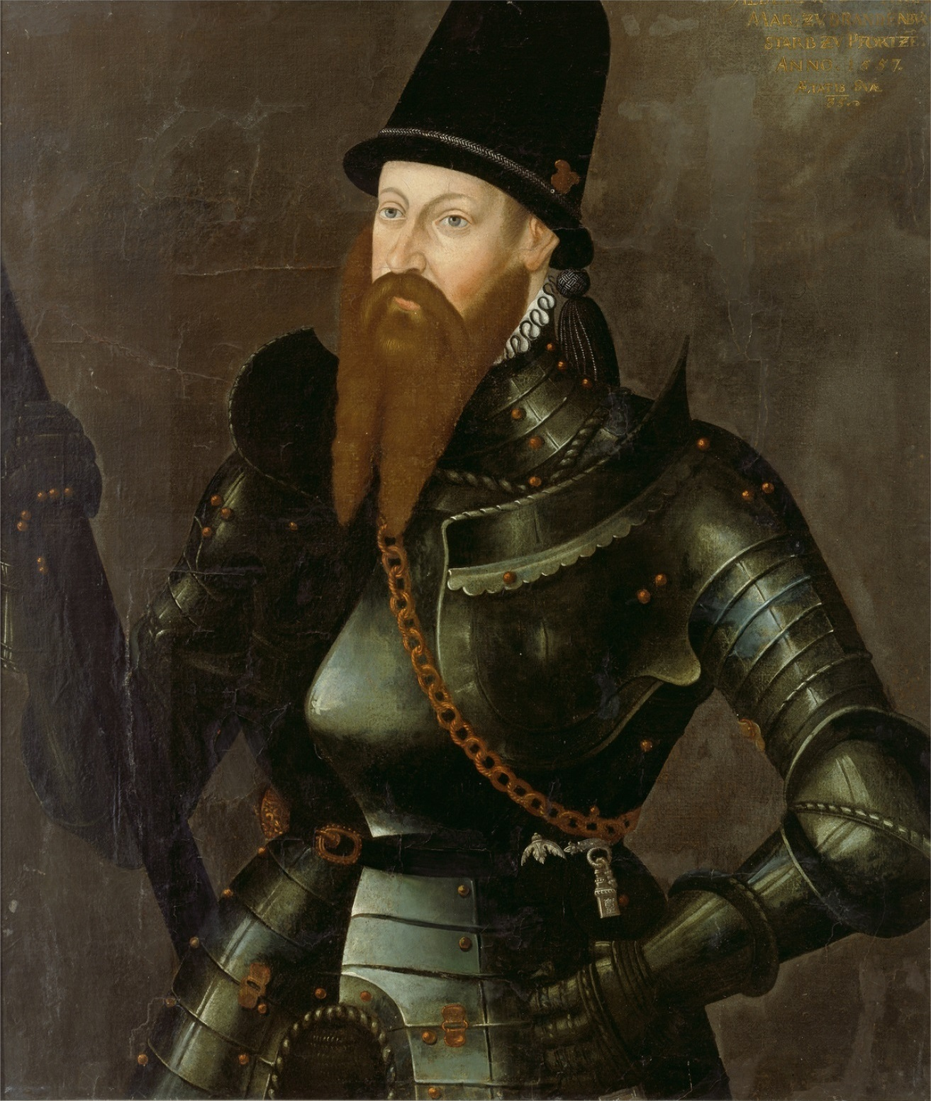 Zeitgenössische Teilkopie nach einem 1557 datierten postumen Ganzfigurenbildnis von Andreas Riehl d.Ä. aus dem ehemaligen Berliner Zeughaus.